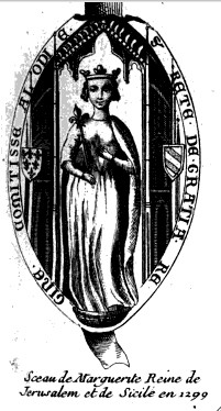 Markéta Burgundská